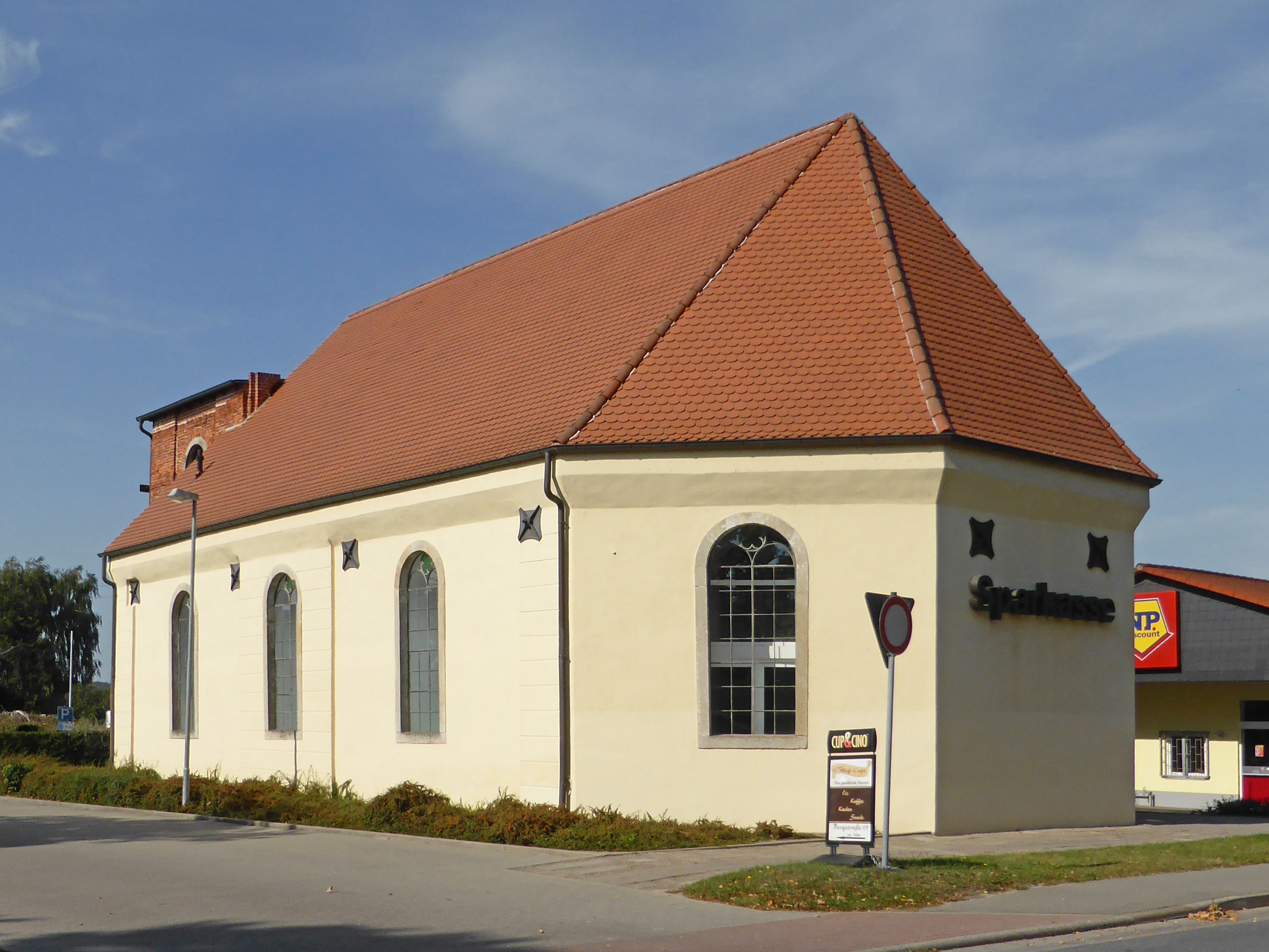 Sparkassenfiliale in Milow, ehemalige Leopoldsburger Kirche.